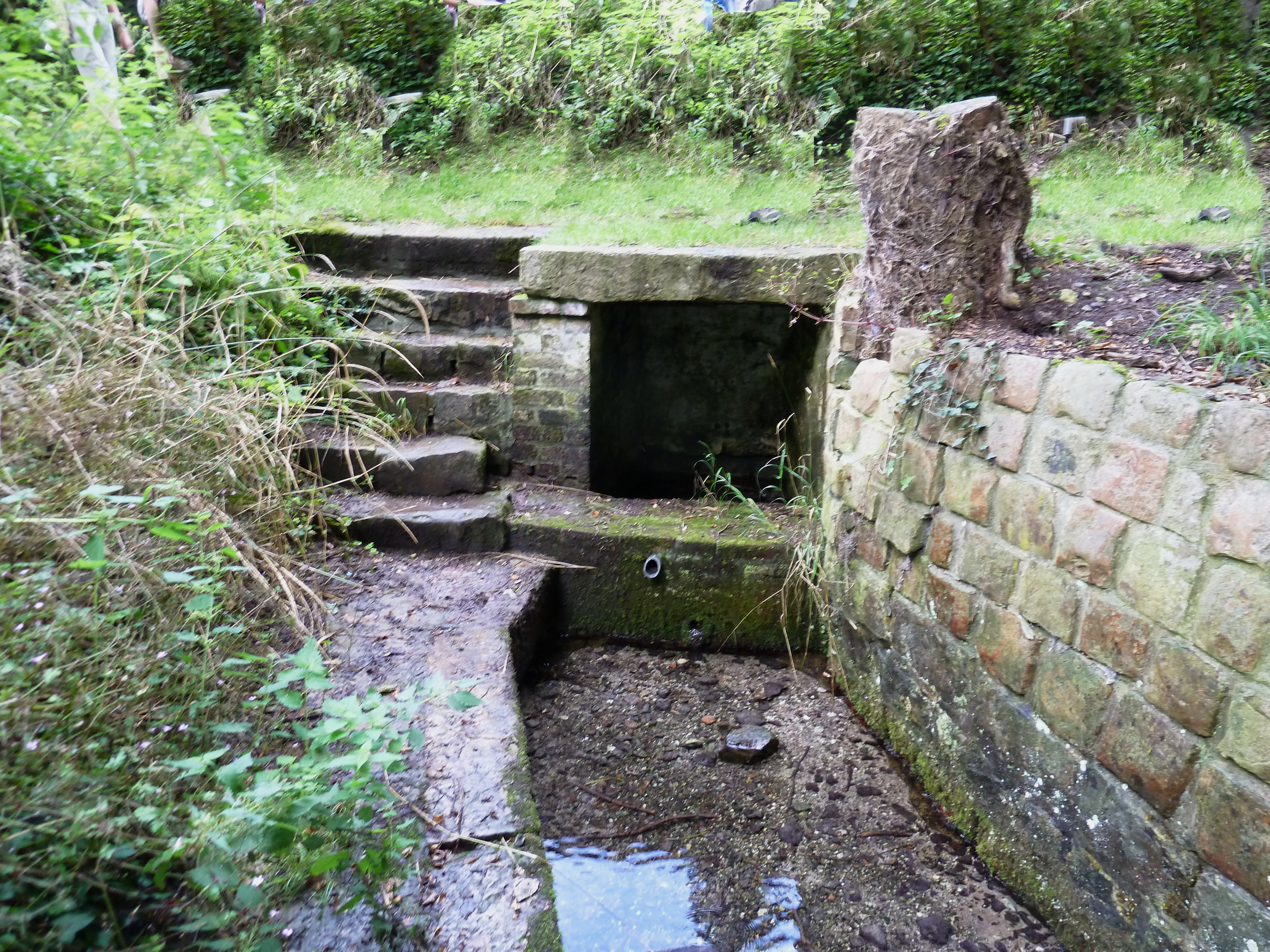 la fontaine des Lainiers Sommaing Nord.- France.